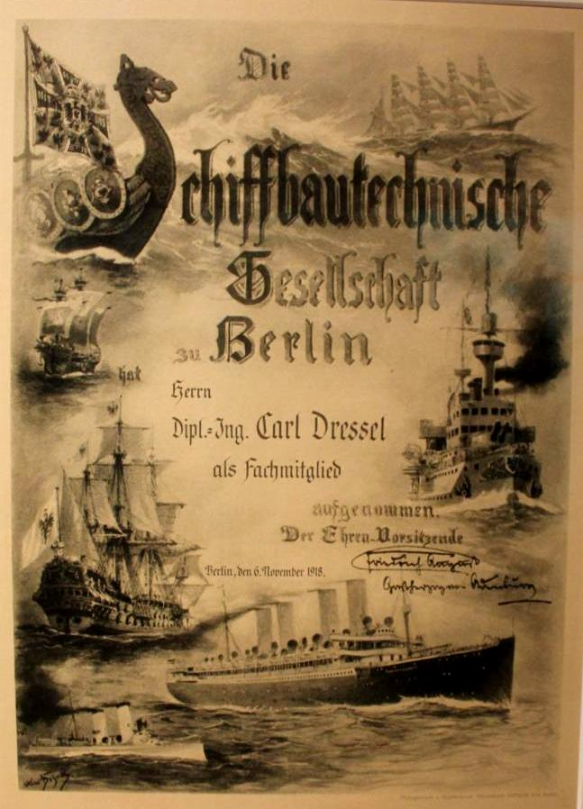 Aufnahmeurkunde der STG 1918